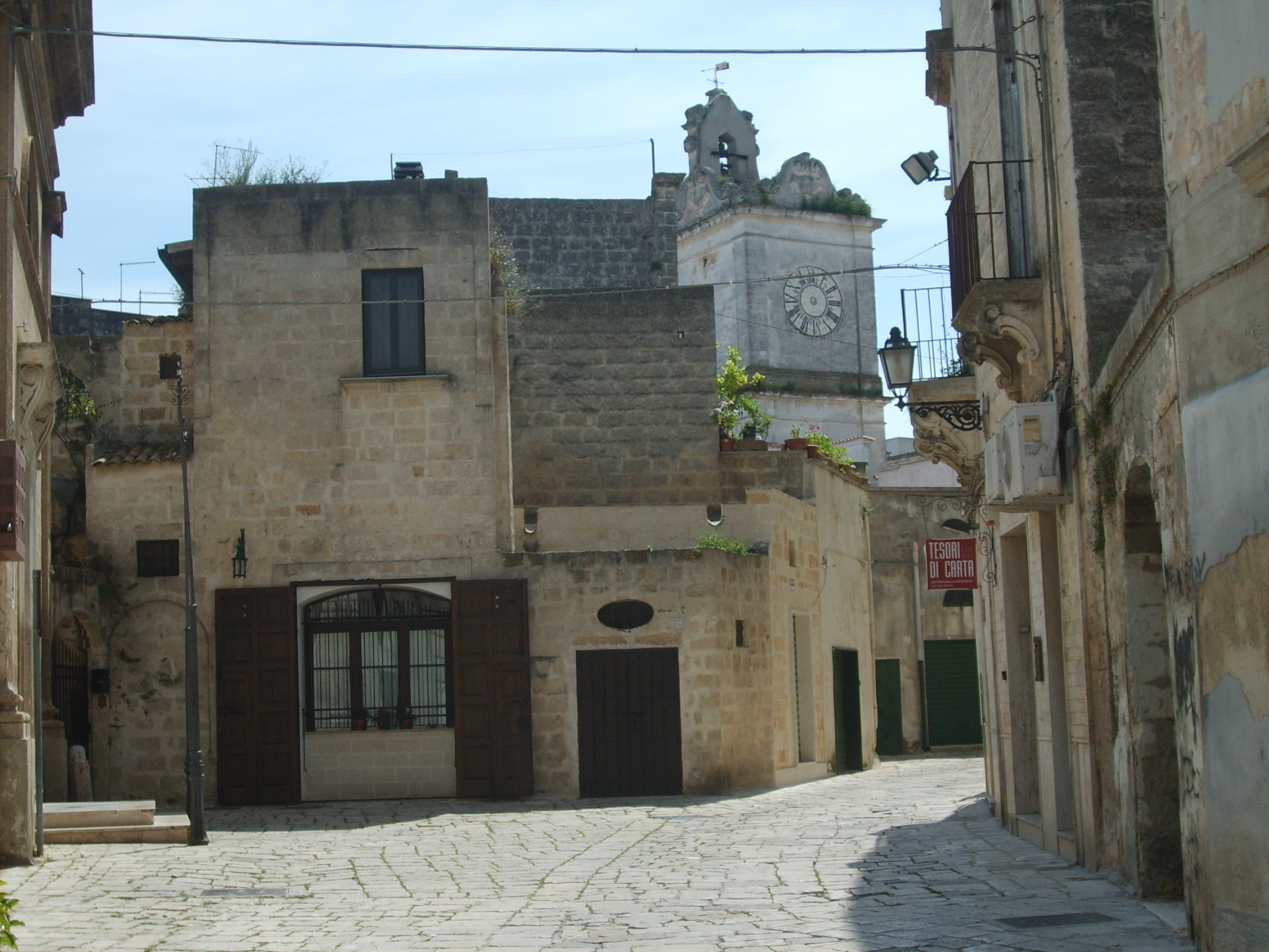 Scorcio del centro storico